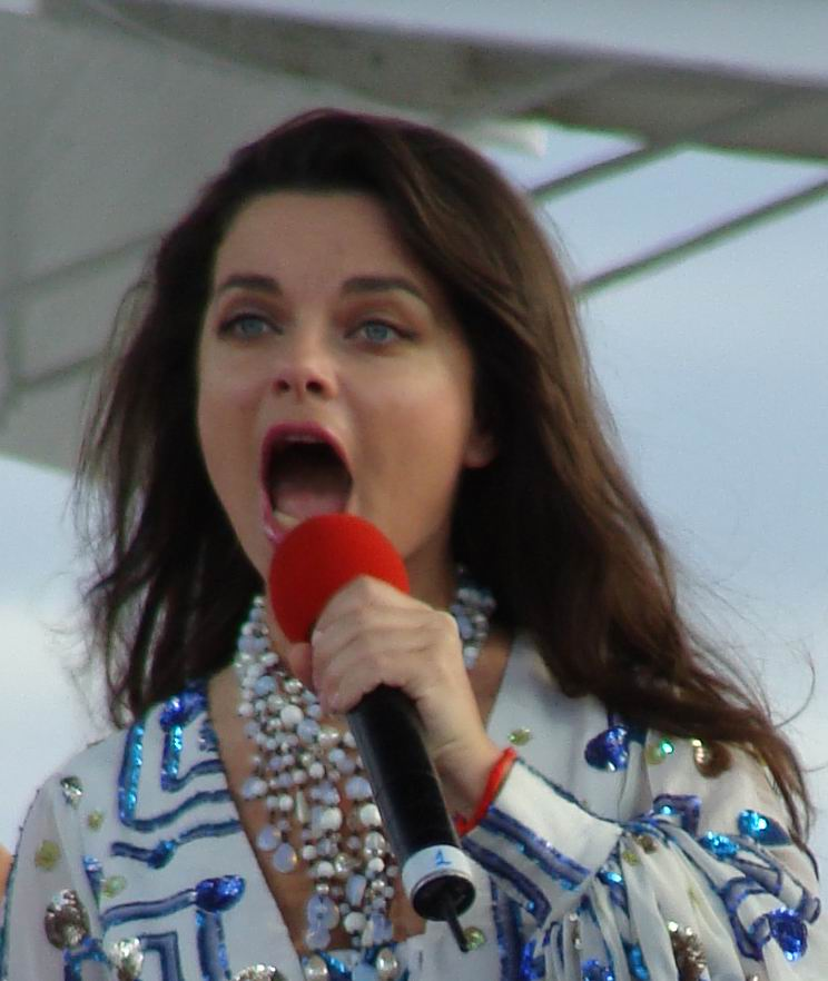 Наташа Королева на съемках клипа "Небеса".